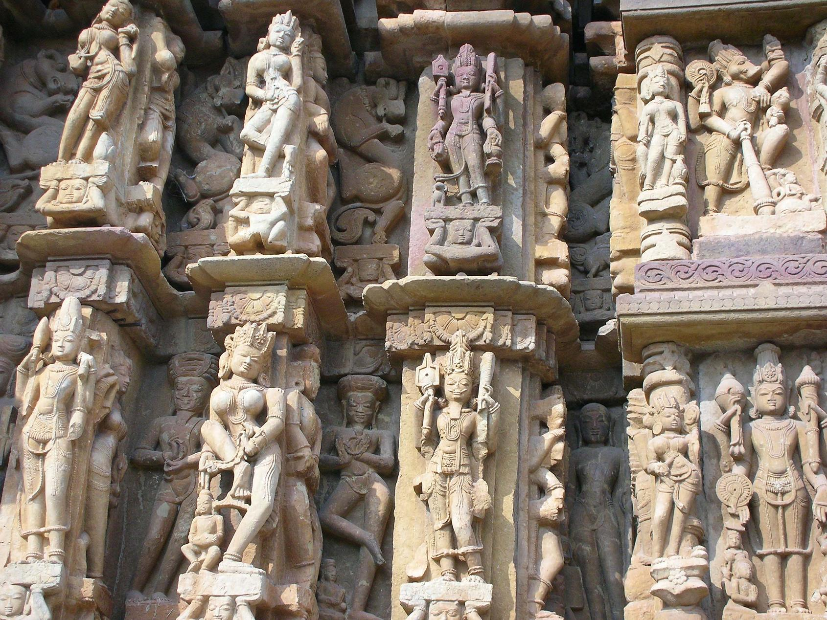 Janjagir Vishnu Temple, Chhatisgarh, India